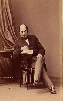 Portrait de Napoléon Joseph Hugues Maret (1803-1898), duc de Bassano, sénateur du Second Empire.